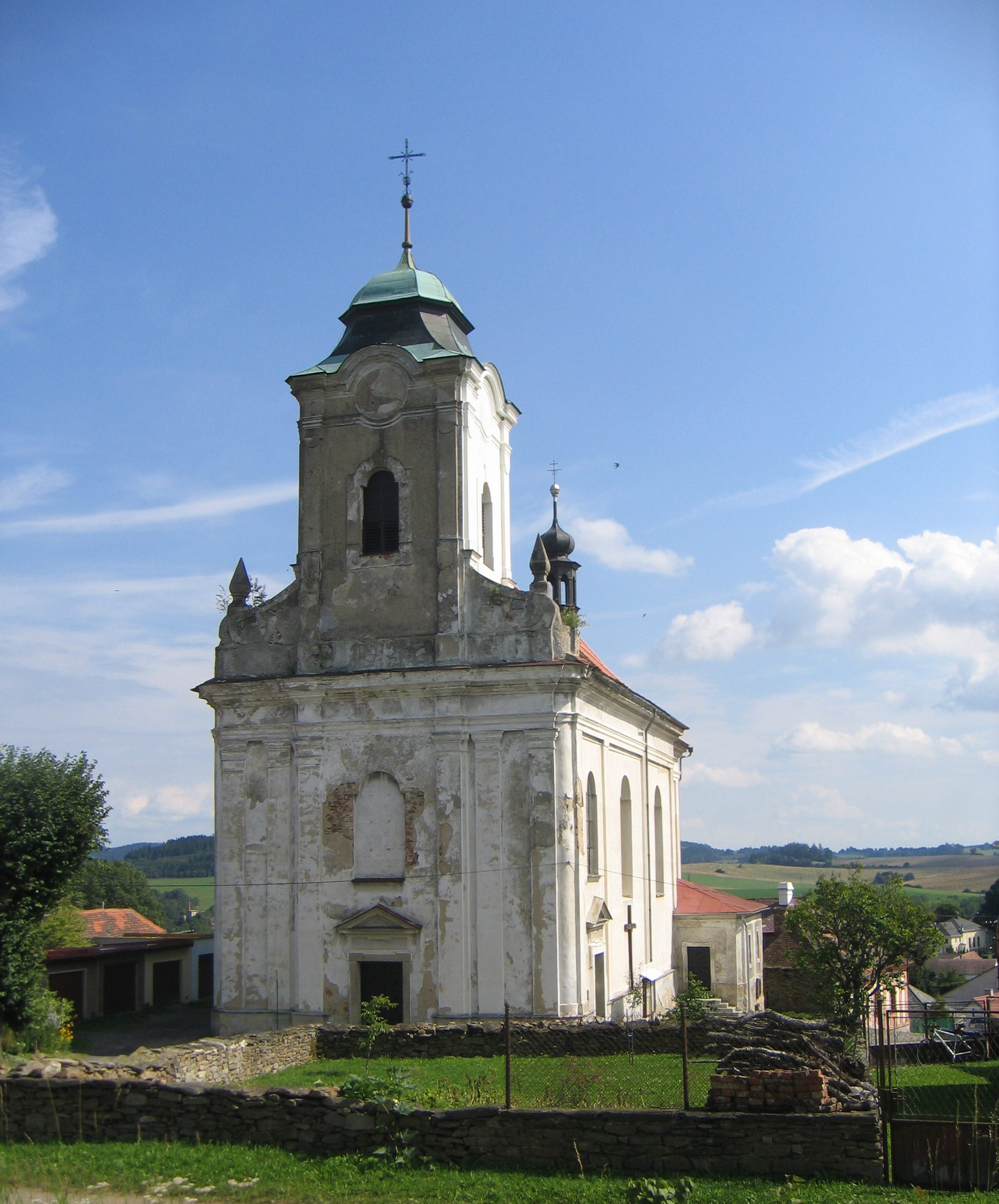 Kostel sv. Blažeje (Plánice), Kostelní, Plánice